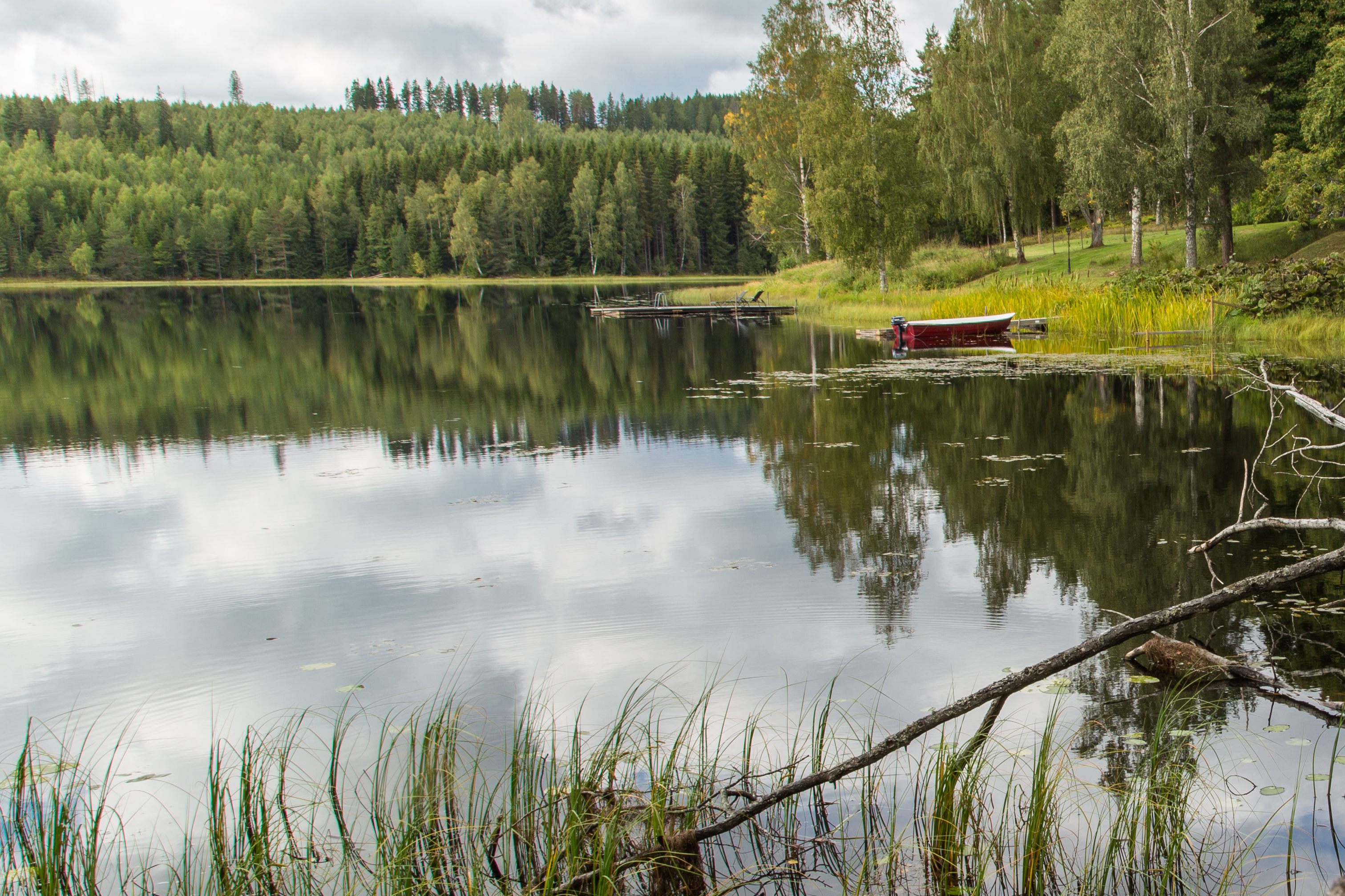 Sjön Botan, Hedemora kommun, Dalarnas län, Sverige. Del av Luståns sjösystem.